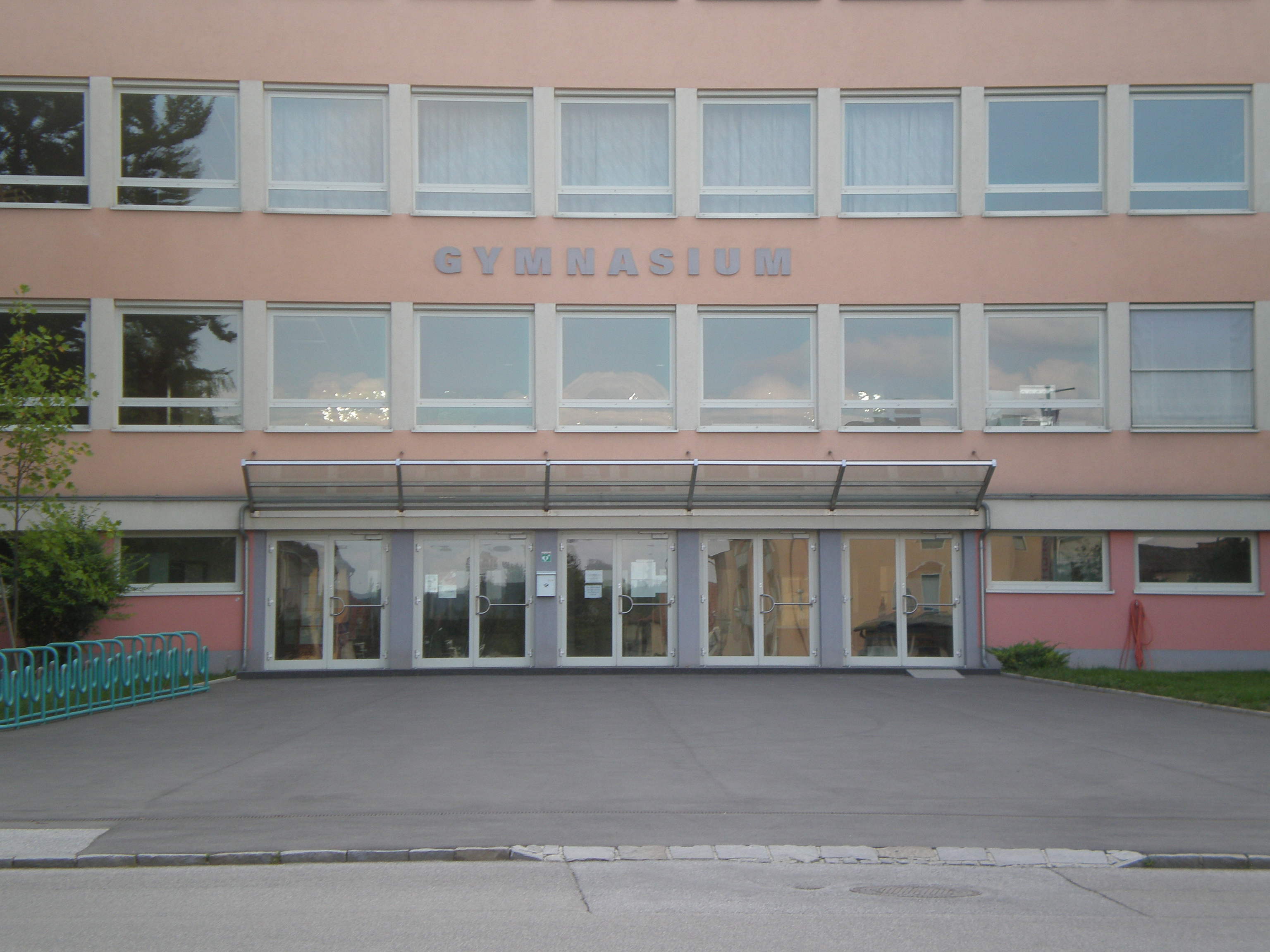 Haupteingang des Gymnasiums